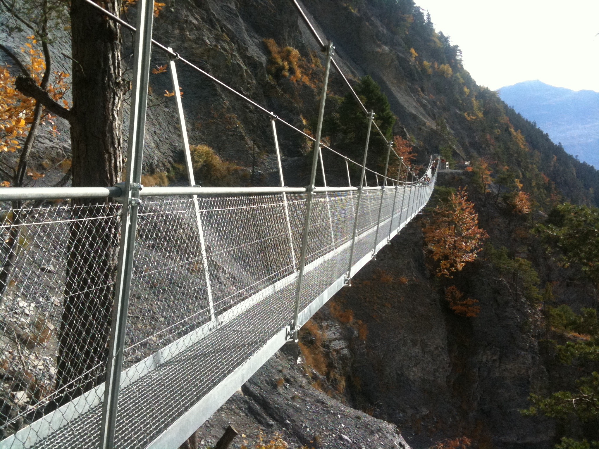 Bisse Pont suspendu 140 m Savièse